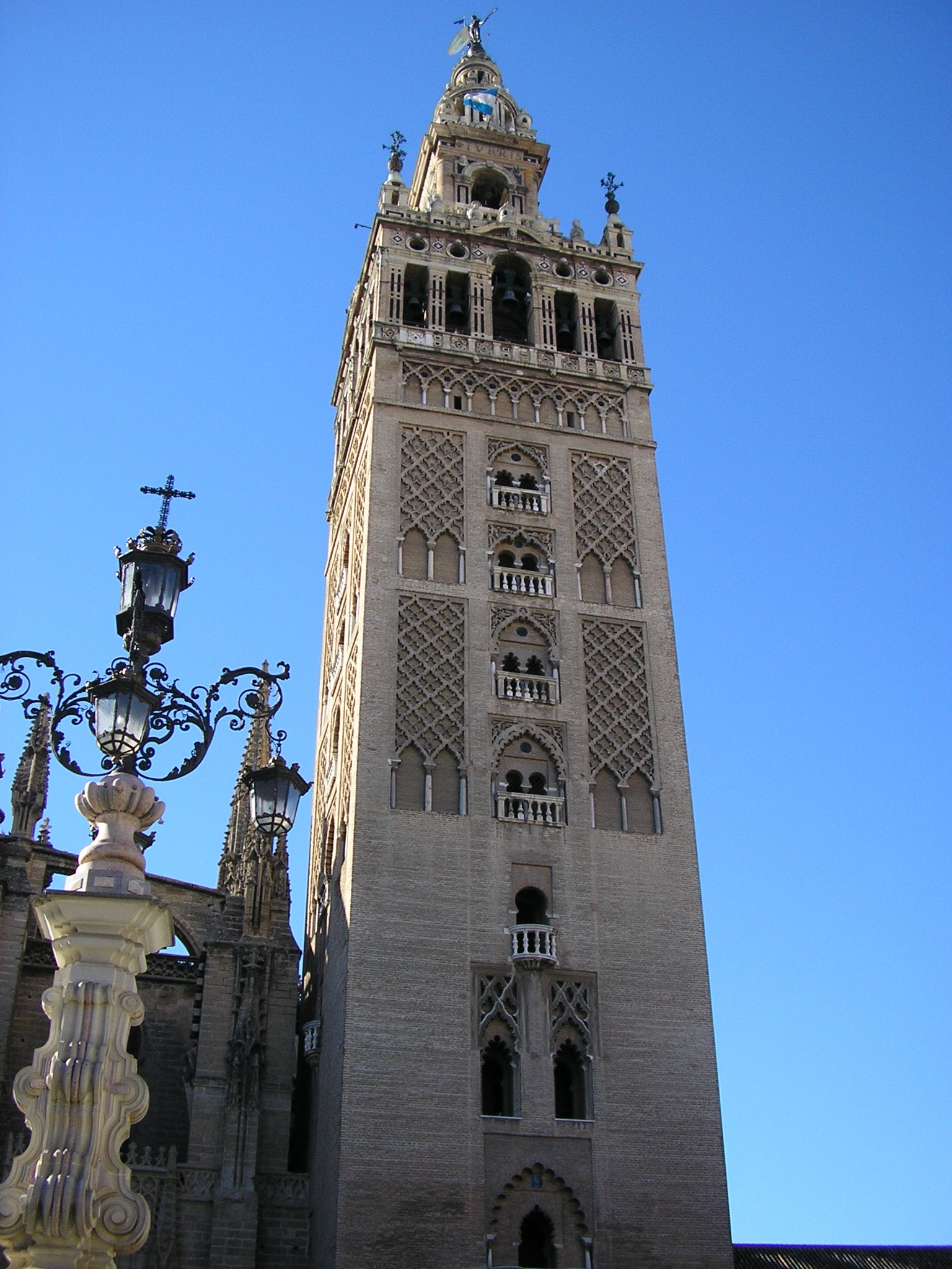 Giralda en Sevilla. Source: Makinal